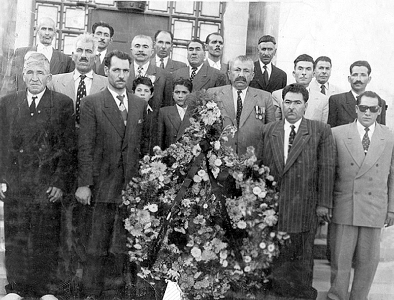 محمدحسین خان، خان ایل سگوند